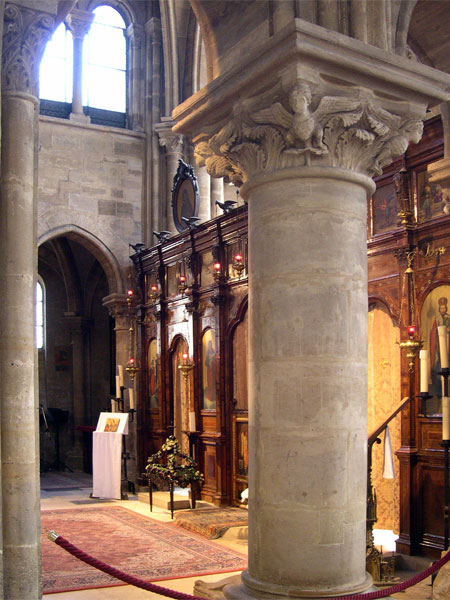 Interior de l'església de Saint Julien le Pauvre, Paris